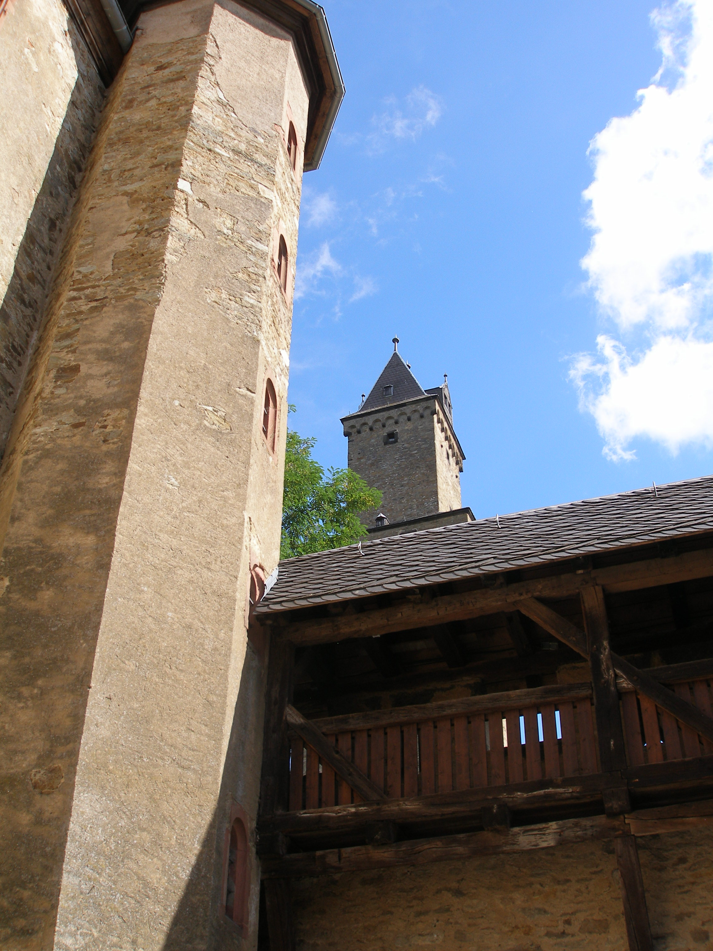 Burg Kronberg